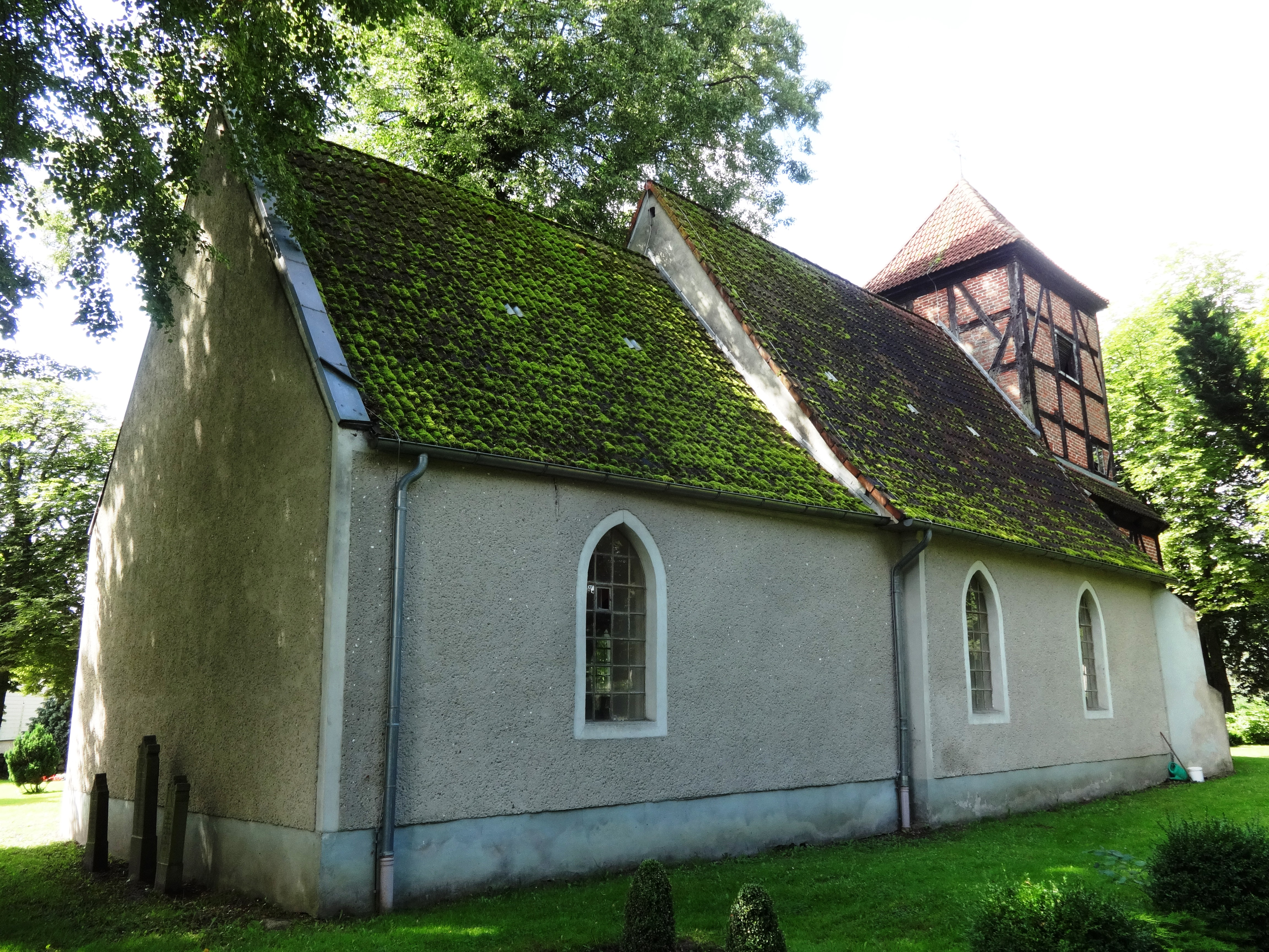 Die Kirche Blesewitz ist eine Saalkirche in Vorpommern. Der Chor stammt aus dem 14. Jahrhundert, das Kirchenschiff kam im 15. Jahrhundert hinzu. Im Innern befindet sich unter anderem ein dreiteiliges Altarretabel aus der Zeit um 1700.